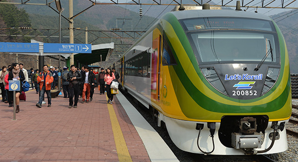 민둥산역에 정차한 중부내륙순환열차